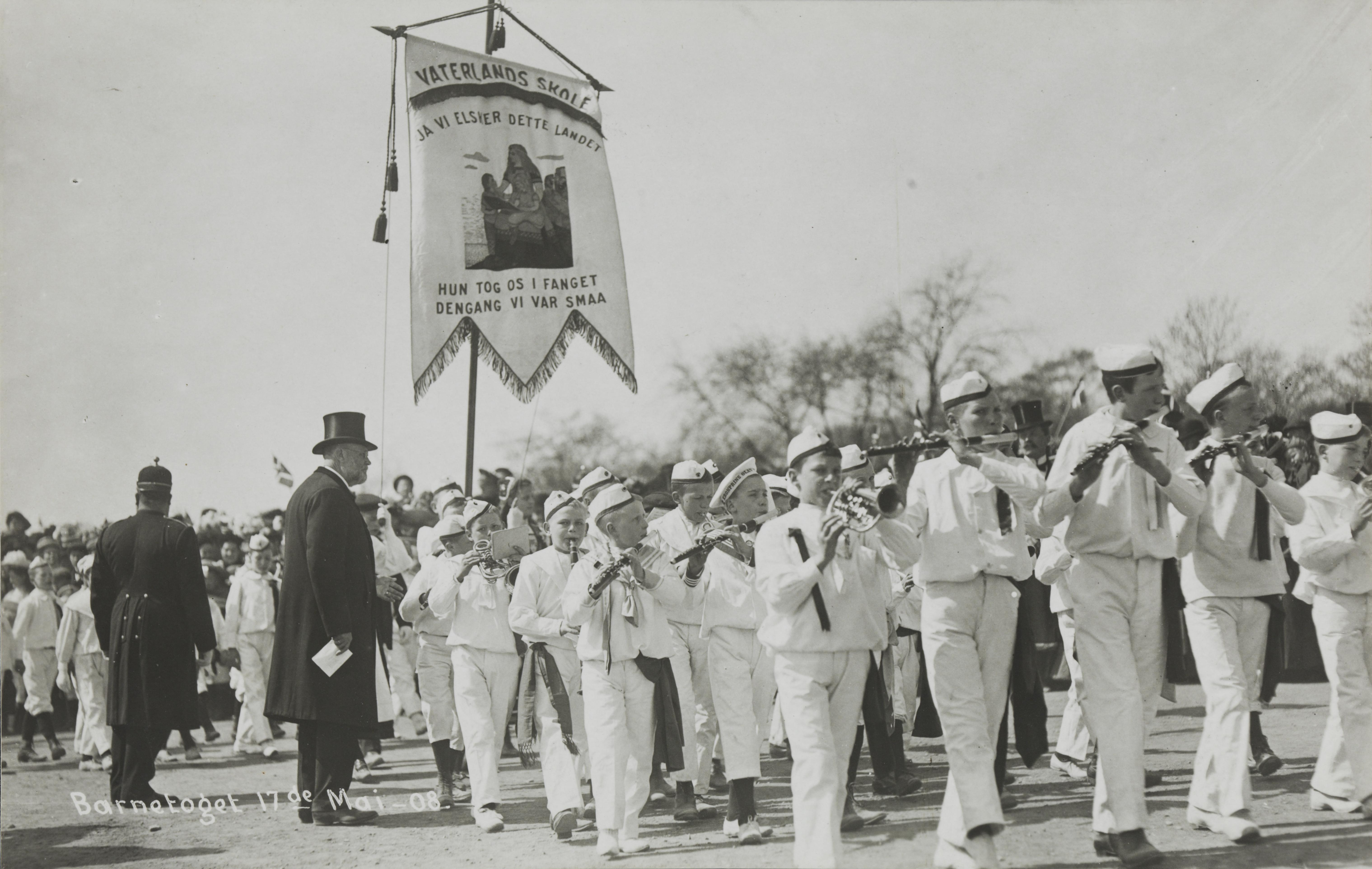 Bildet er hentet fra Nasjonalbibliotekets bildesamling. Sitatene «Ja vi elsker dette landet» og «Hun tog os i fanget dengang vi var smaa» fra henholdsvis Bjørnstjerne Bjørnsons «Norsk Fædrelandssang» og «Der ligger et land» fra 1859.